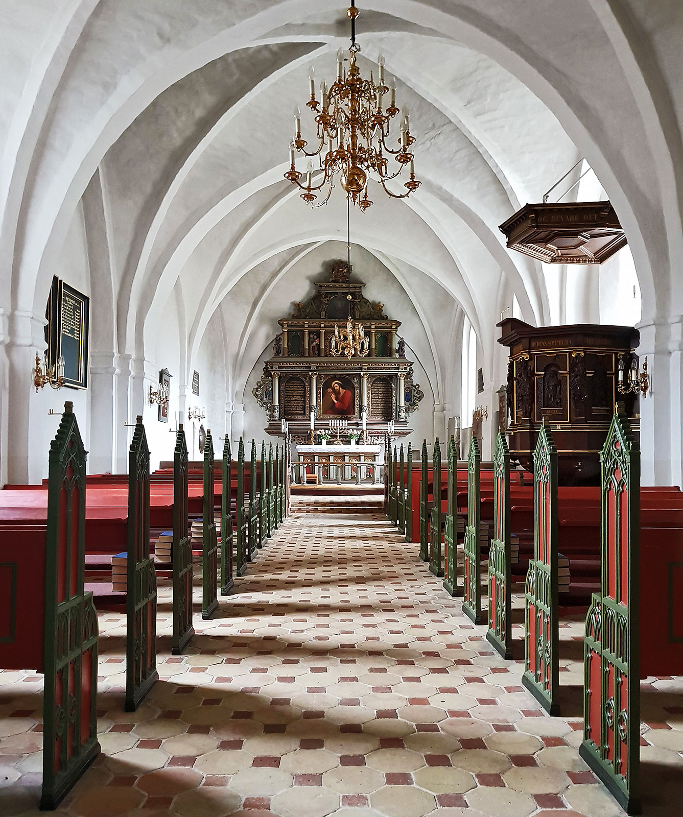 Kirkeskibet kirkerummet i Høje Taastrup Kirke